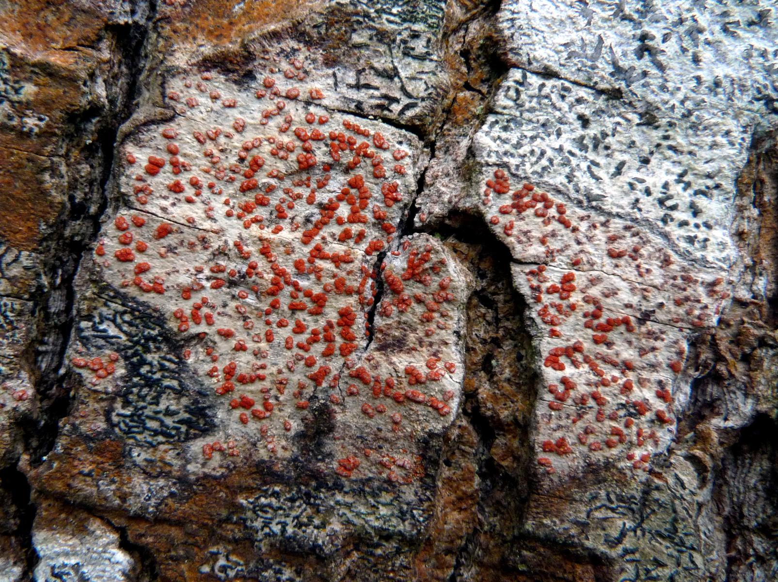 Arthonia cinnabarina, bois de Kererault (Plougastel, Finistère, Bretagne, France)